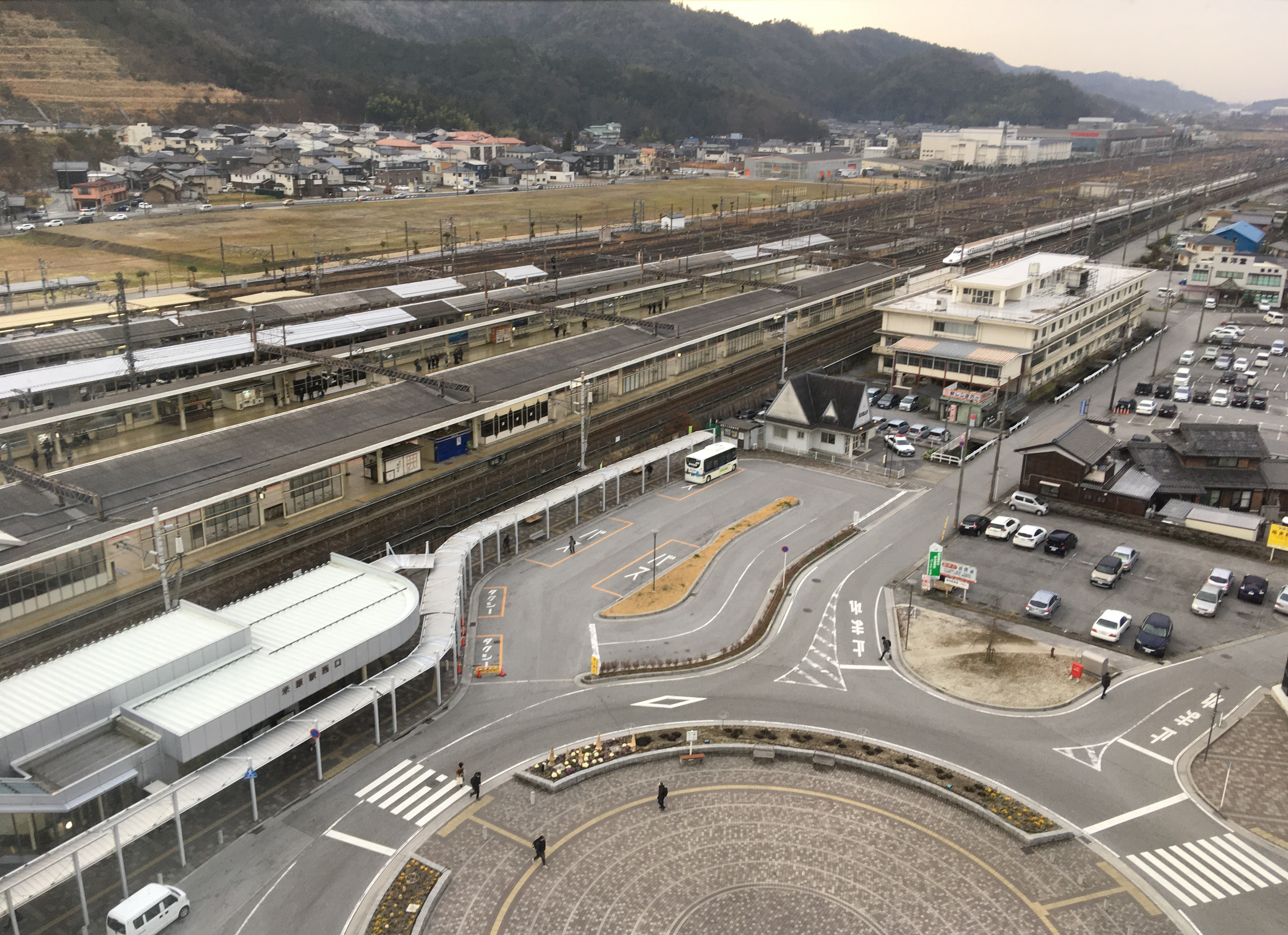 東横INN米原より撮影